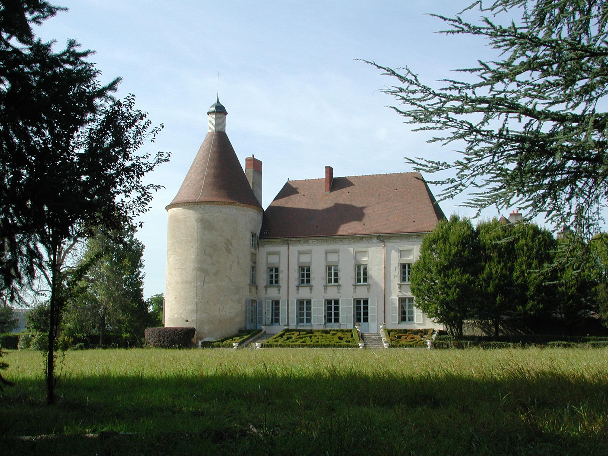 Saint-Germain-de-Salles (Allier). Château de Salles. Façade sud-est sur parc.